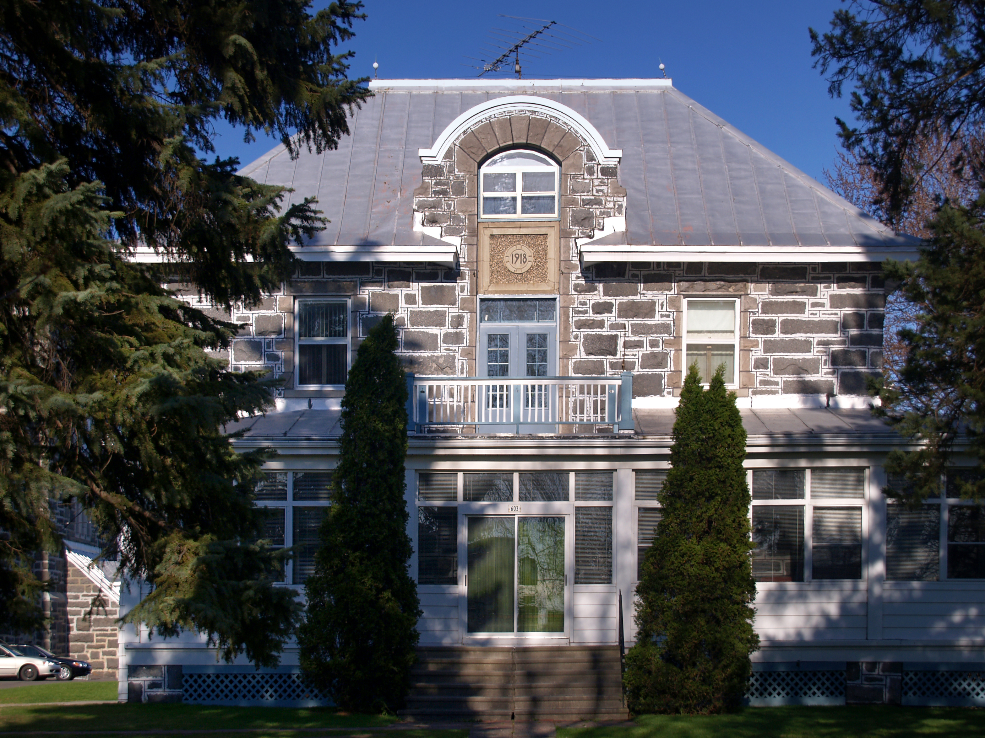 Marieville (Québec) - Presbytère